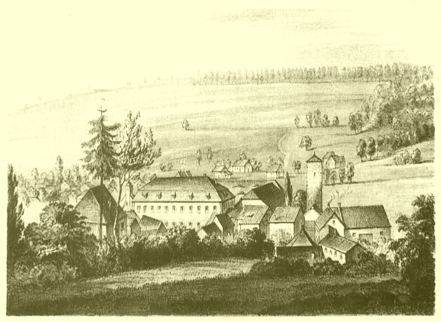 Das Rittergur Farnroda um 1850. - Älteste bekannte Ortsansicht von Farnroda. Im Original handcoloriert.